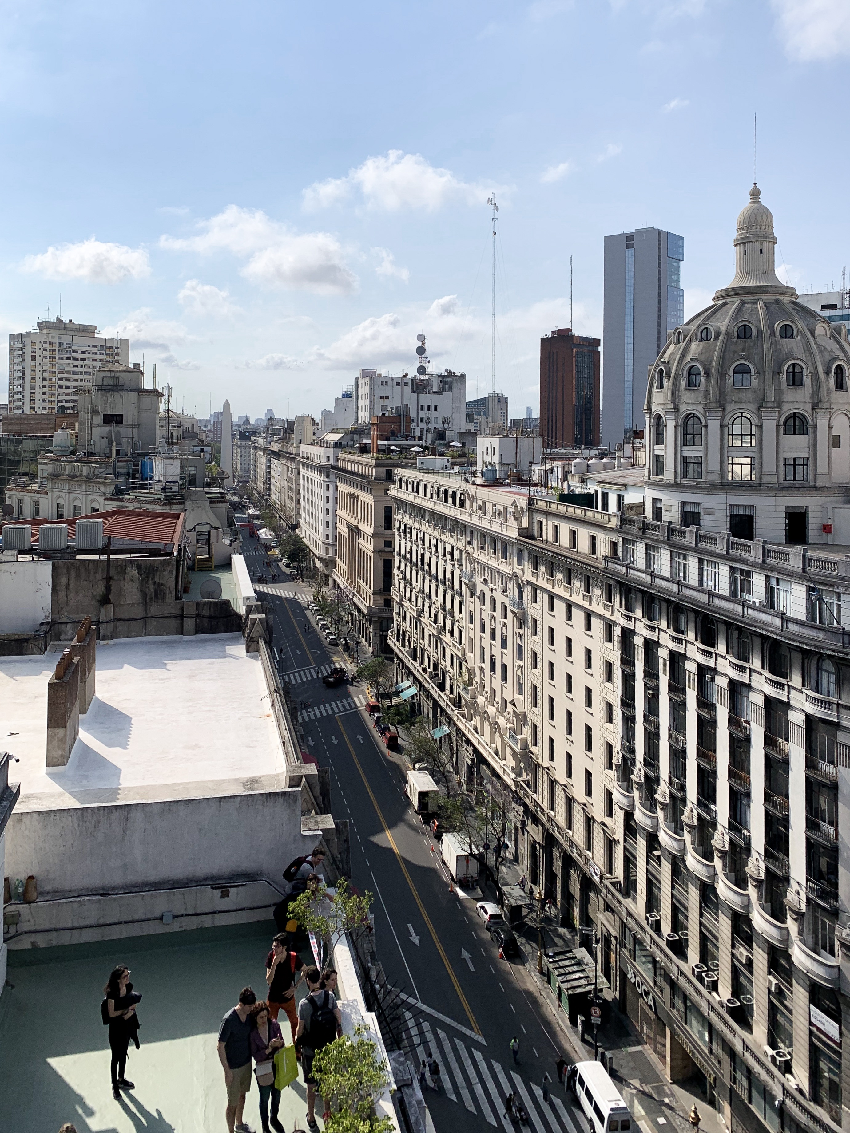 Avenida Diagonal Norte - Buenos Aires.